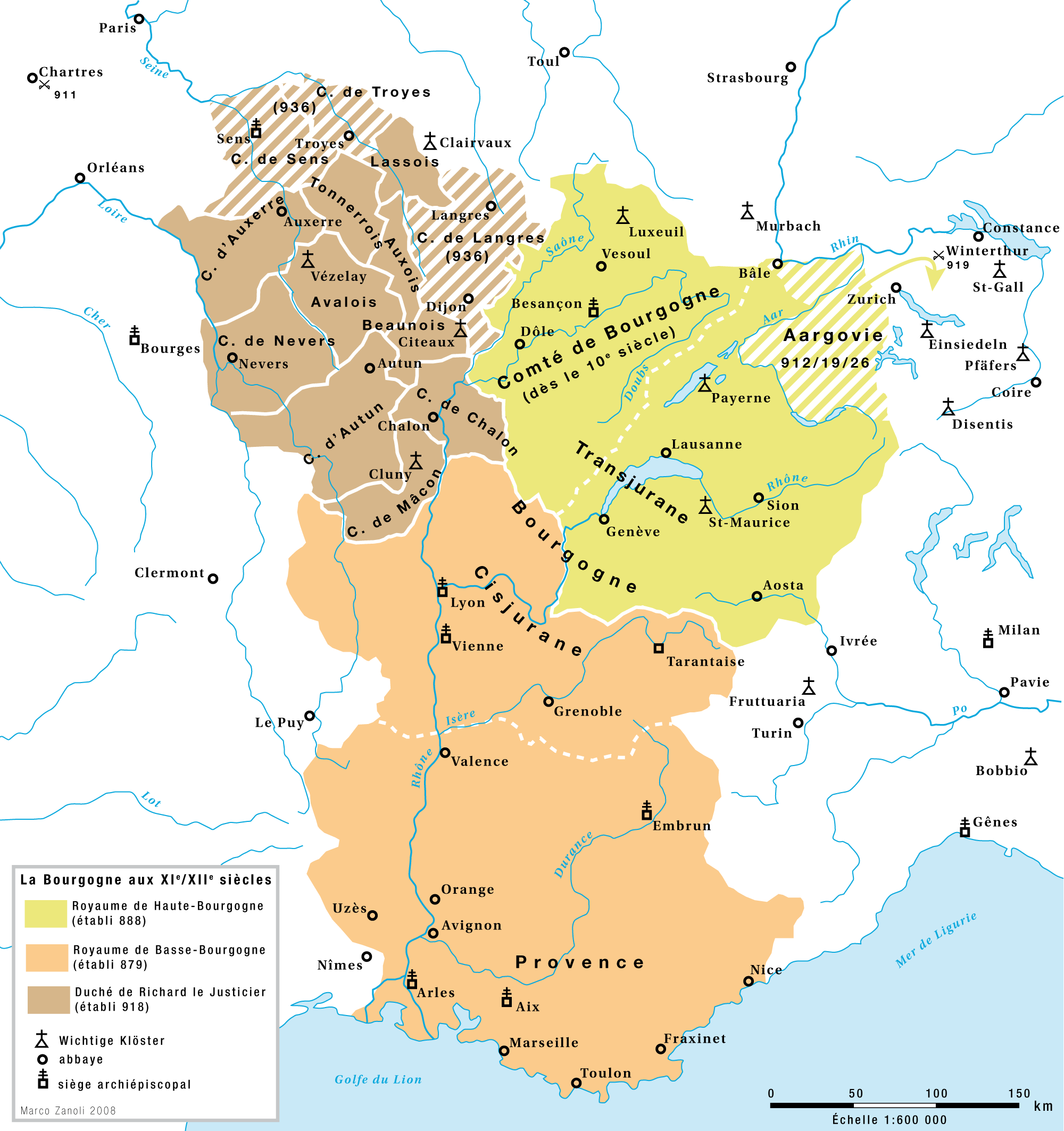 La Bourgogne aux XIe et XIIe siècles